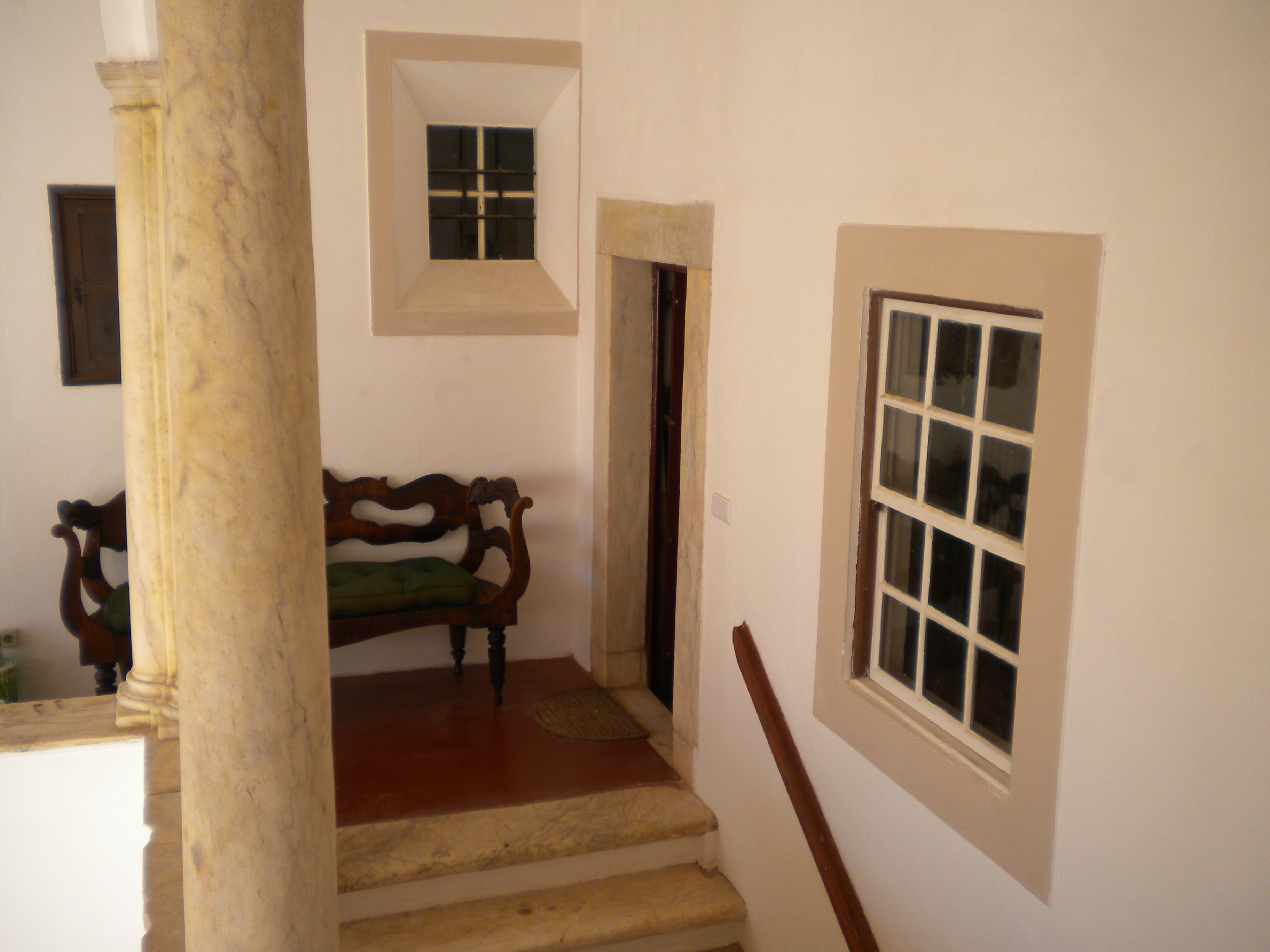 Claustro após subida da escadaria em mármore para o andar nobre do Palácio Matos Azambuja ou Casa dos Arcos